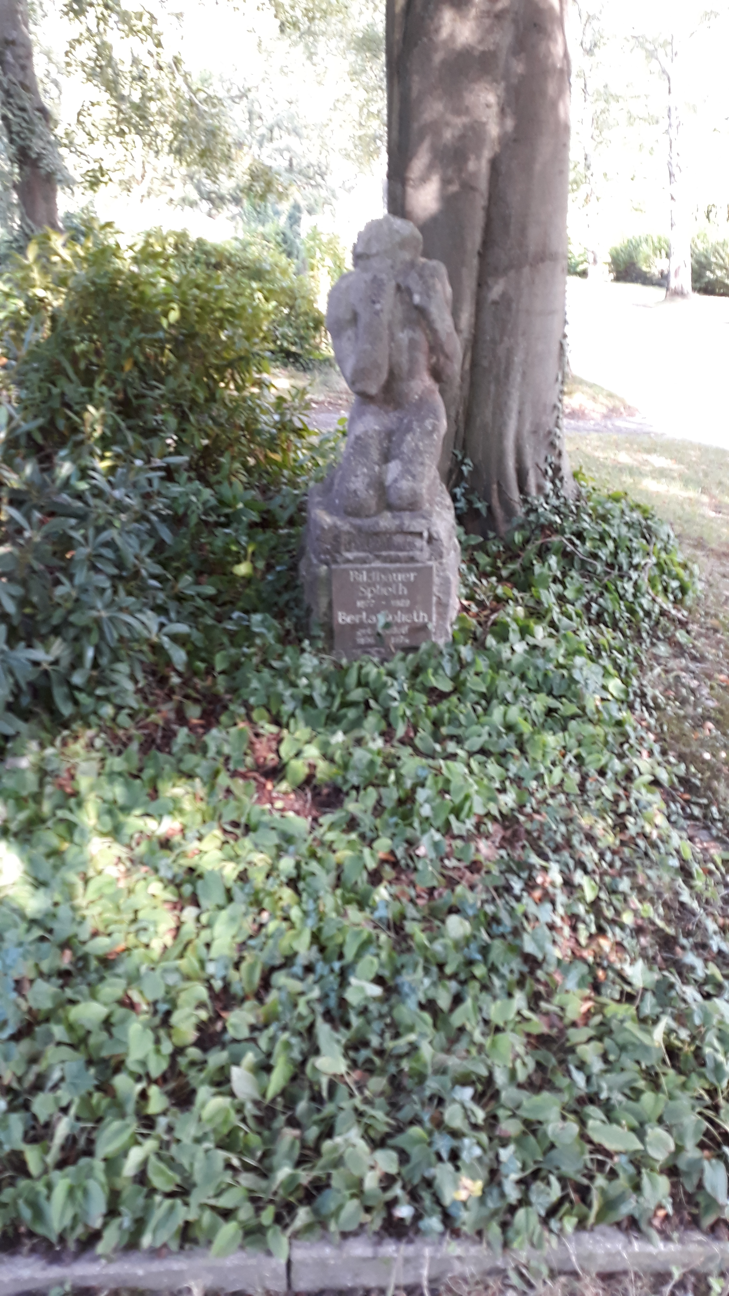 Das Grab des deutschen Bildhauers Heinrich Splieth und seiner Ehefrau Bertha auf dem Hauptfriedhof Iserlohn. Grabfigur nach eigenem Entwurf.